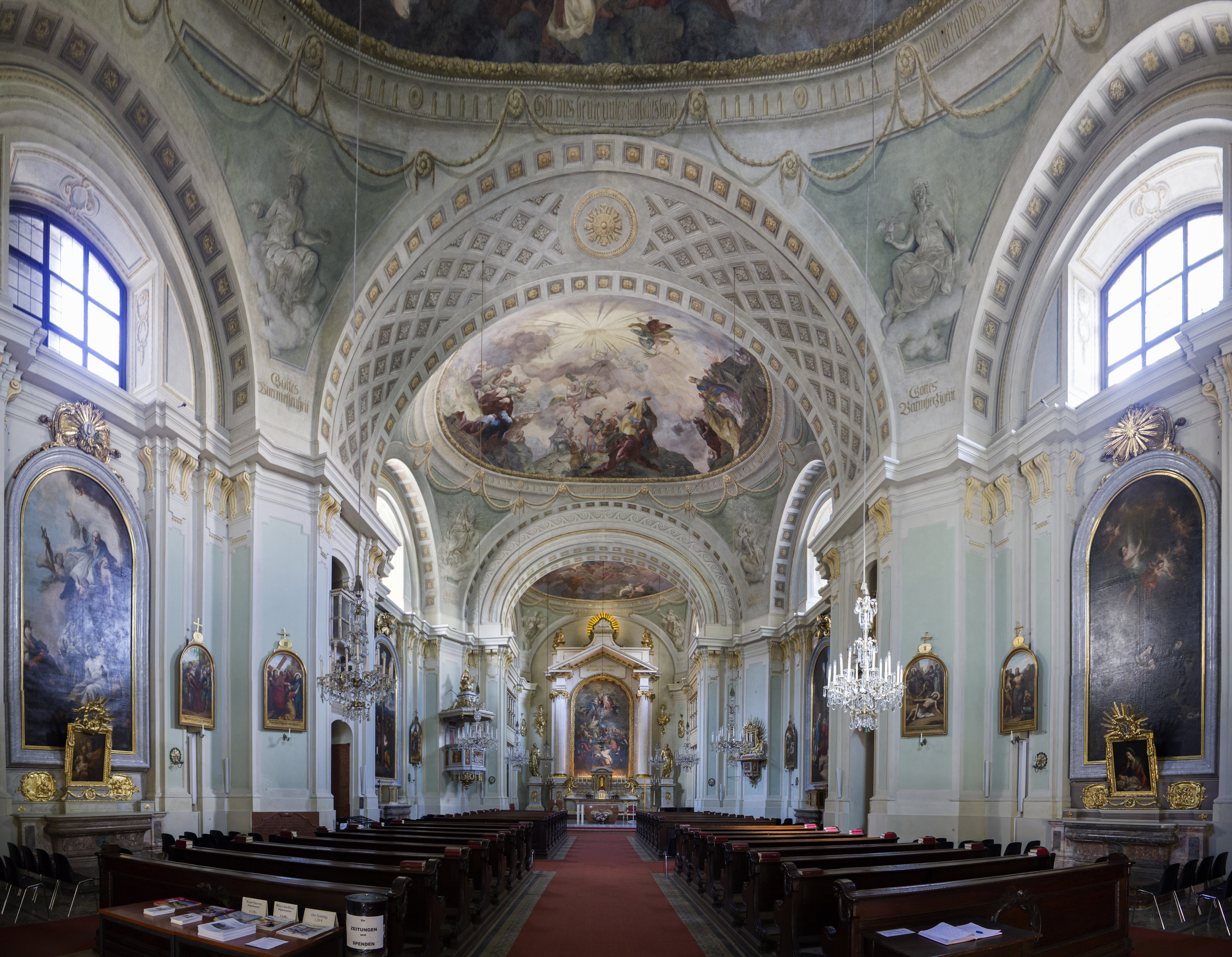 Schubertkirche innen; zylindrisch gestitched (verzerrt)